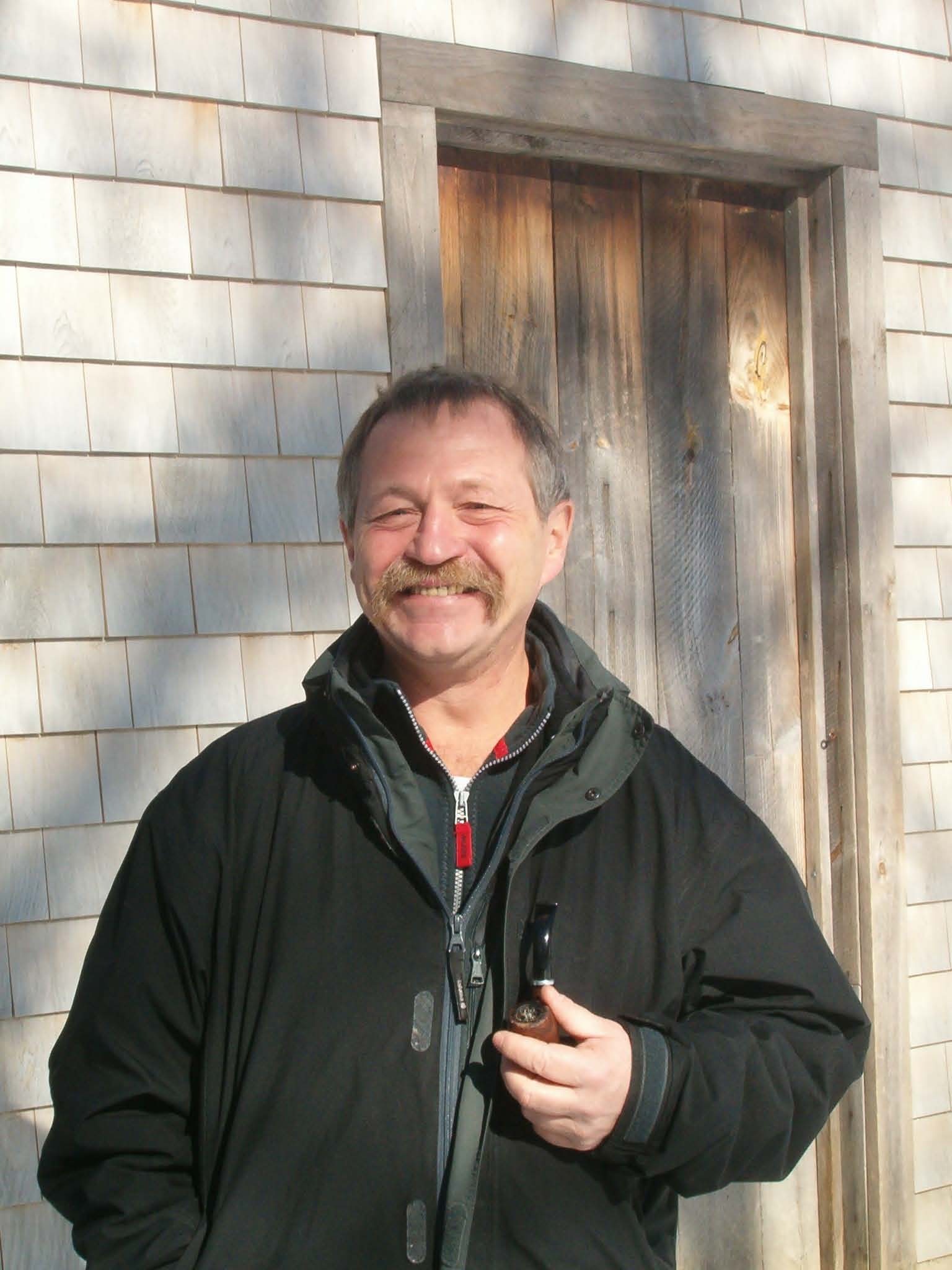 José Bové devant la porte de la réplique de la cabane en bois de David Thoreau à Walden Pond. L'écologiste tient une pipe à la main gauche. Debout devant la porte d'entrée de la cabane en bois de Thoreau, il sourit à l'objectif.